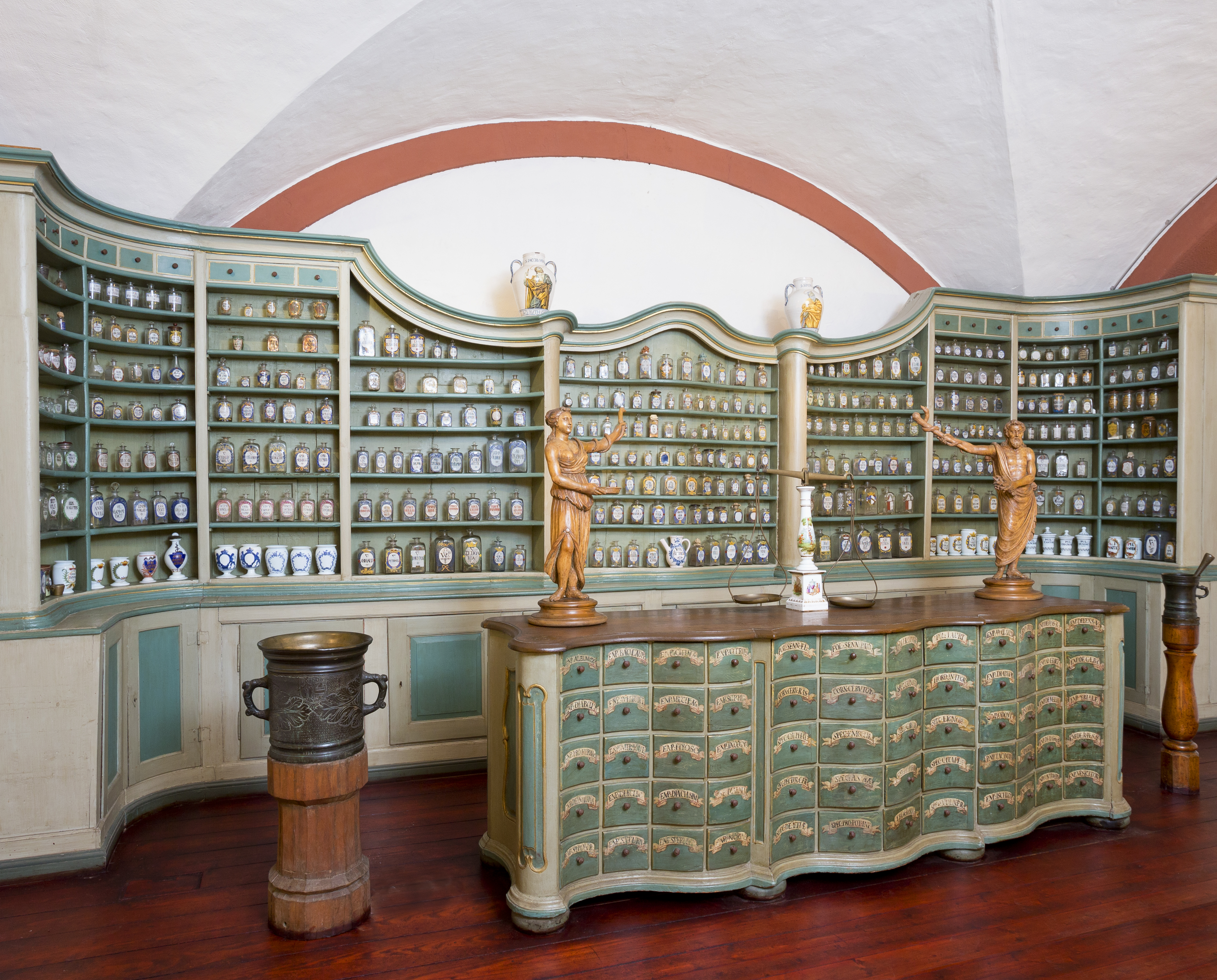 Offizin aus Schwarzach im Deutschen Apotheken-Museum (1. Hälfte 18. Jh.)